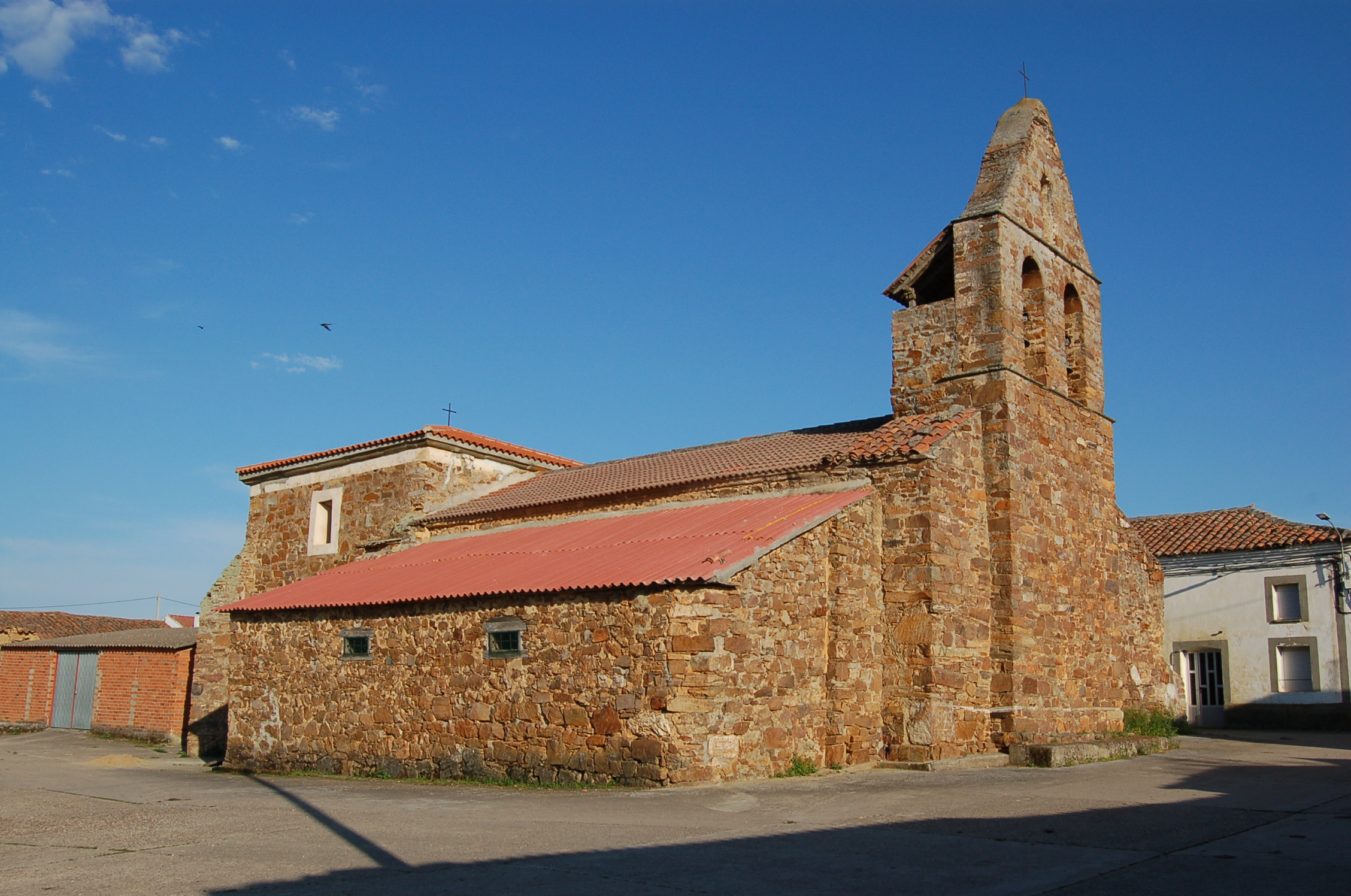 Igrexa de Santa María de Valverde